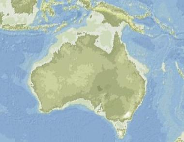 Carte importée depuis en: et remaniée.